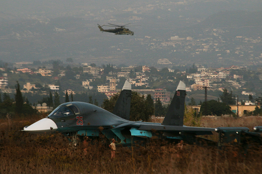 Ночные вылеты самолетов авиагруппы ВКС РФ в Сирии